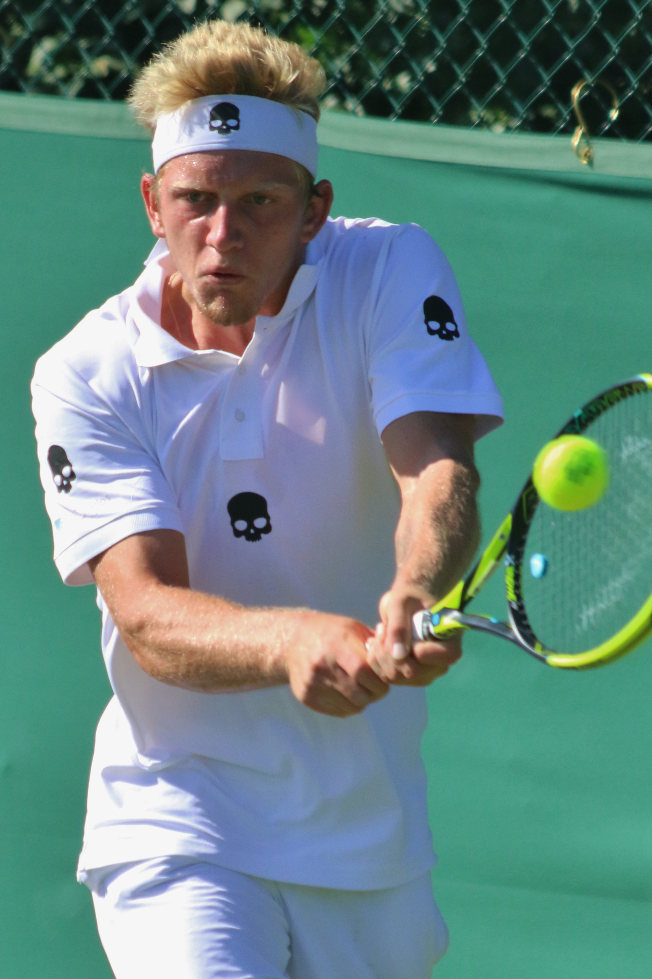 Davidovich Fokina WMQ18 (33)